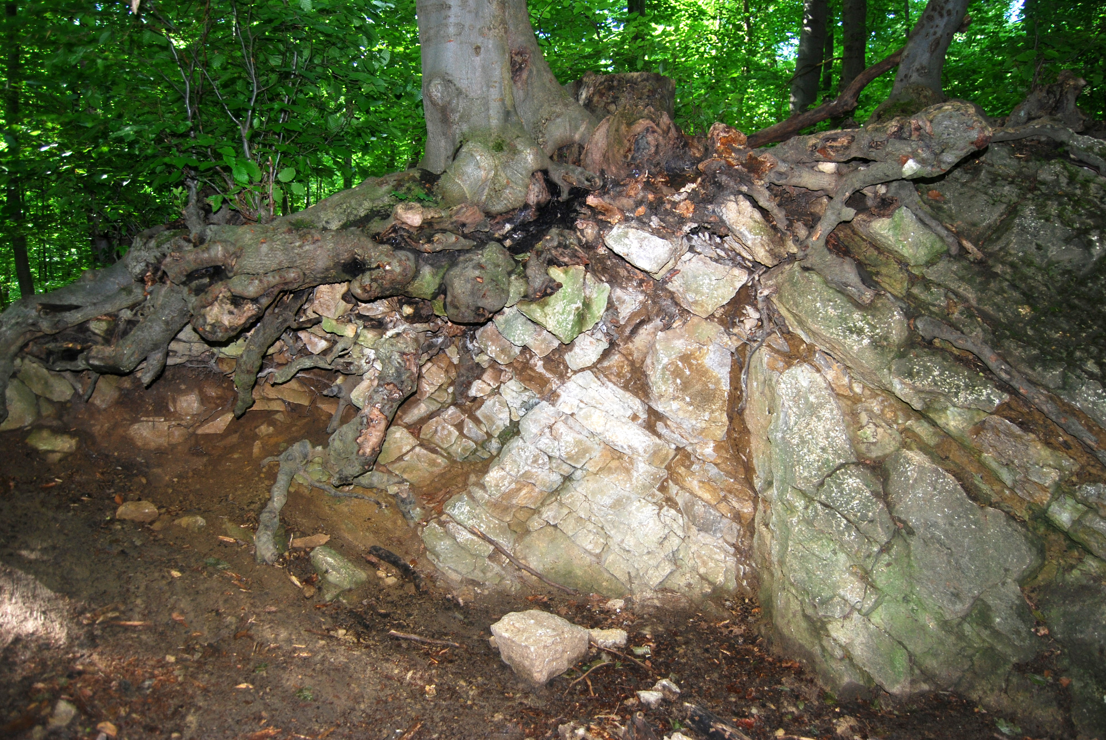 Naturschutzgebiet „Finkenberg/Lerchenberg“ (NSG HA 211), Stadt Hildesheim